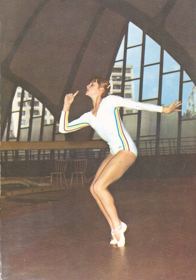 Nadia Comăneci, triplă campioană olimpică, în sala de atletică grea din Gheorghe Gheorghiu-Dej (Onești).